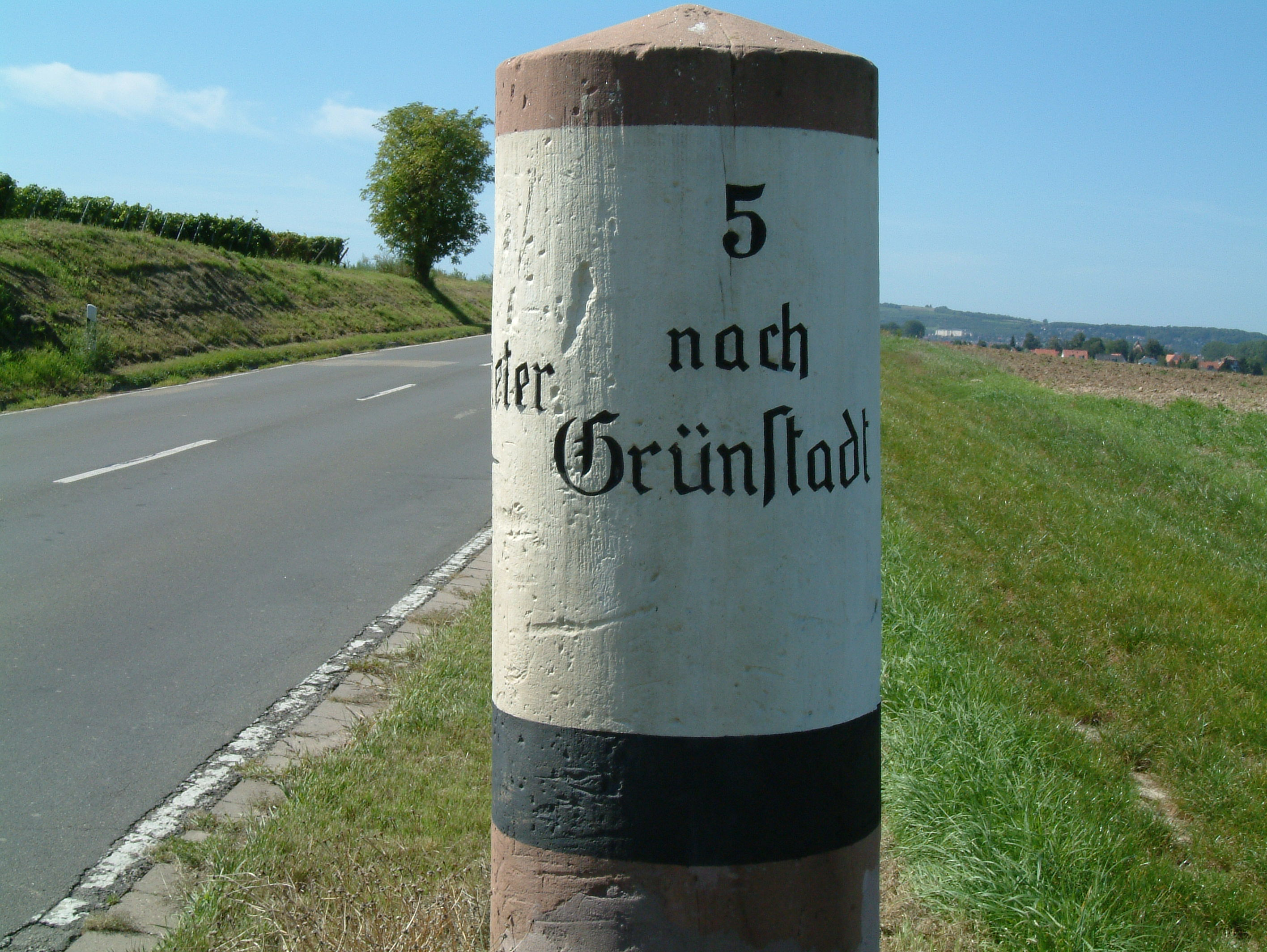 Kilometerstein bei Dirmstein, selbst fotografiert am 09.09.2006 und freigegeben durch Benutzer:Mundartpoet